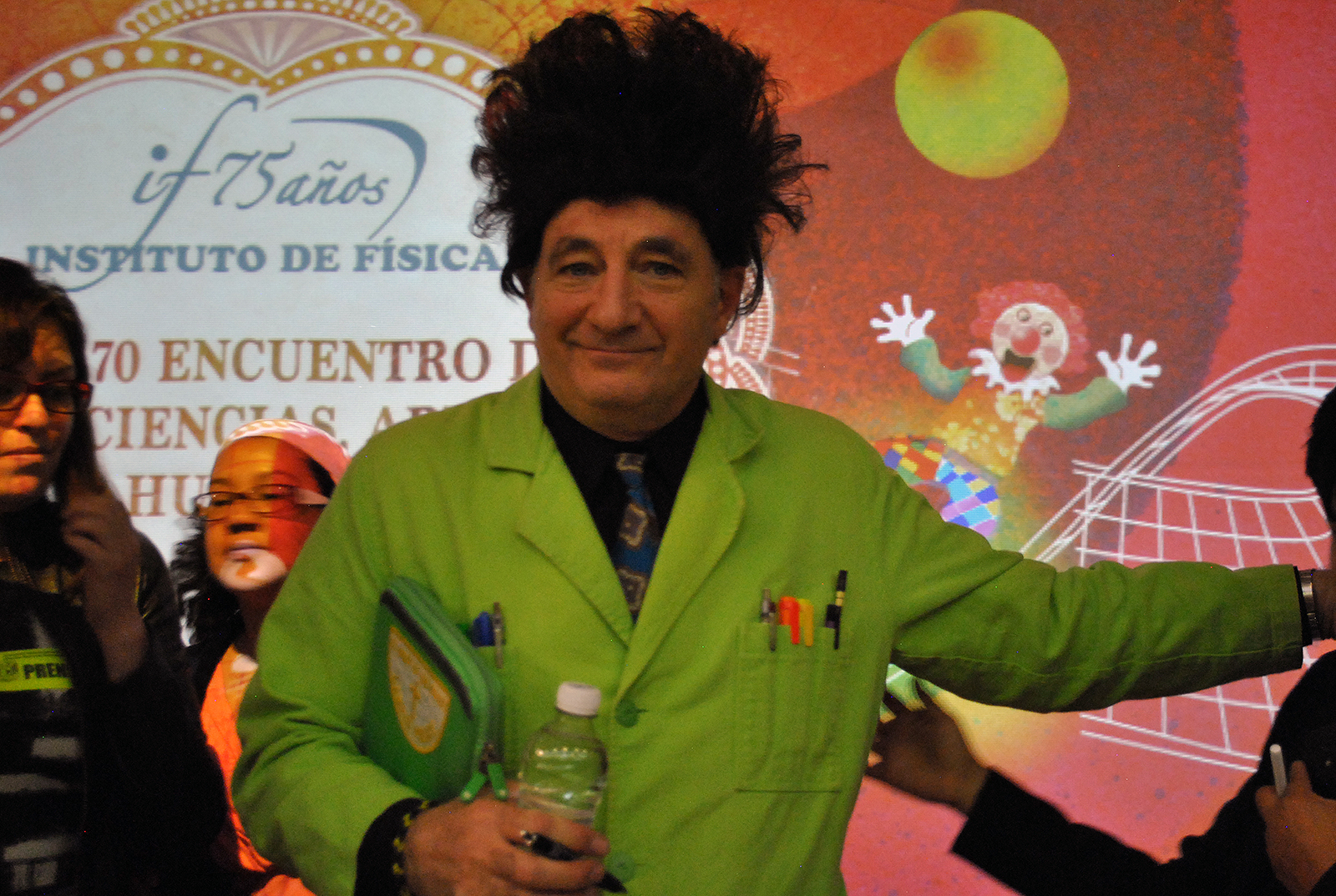 Durante la conferencia de prensa de Paul Zaloom en México.